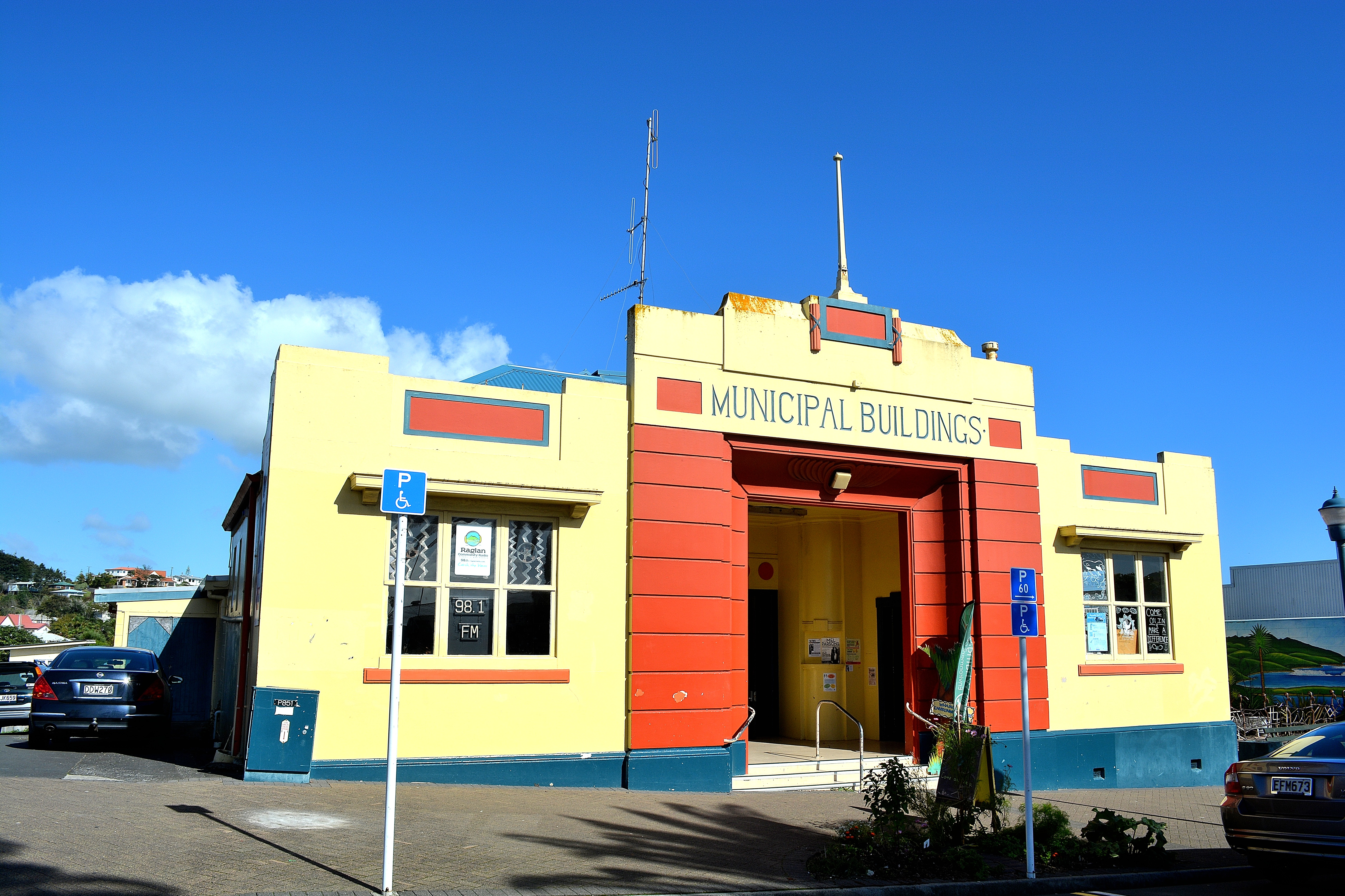 Raglan.New Zealand